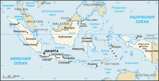 Karte von Indonesien aus CIA World Fact Book